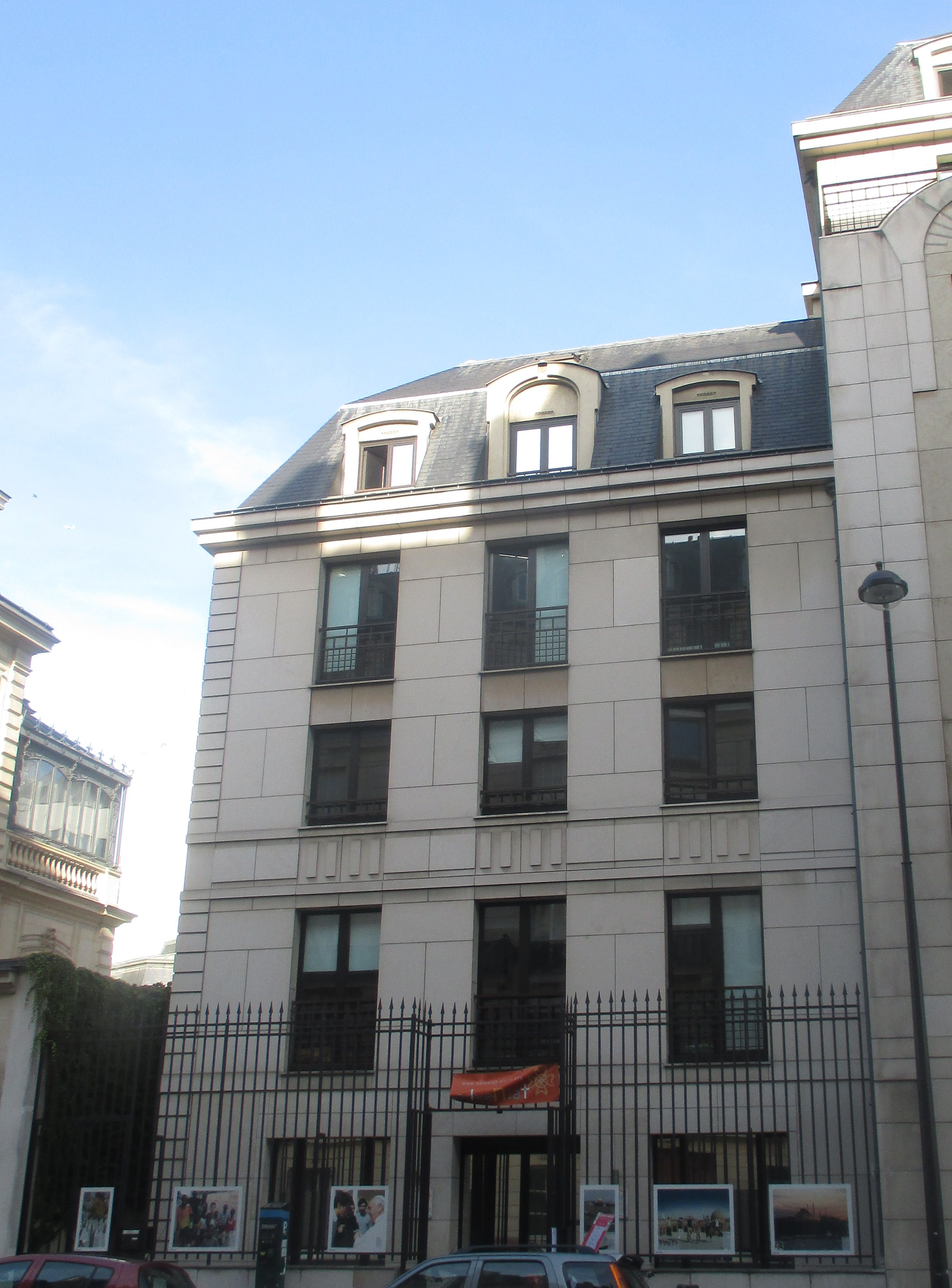 Façade de l'auberge de jeunesse Adveniat, tenue par les Assomptionnistes, 10 rue François Ier (Paris VIIIe).